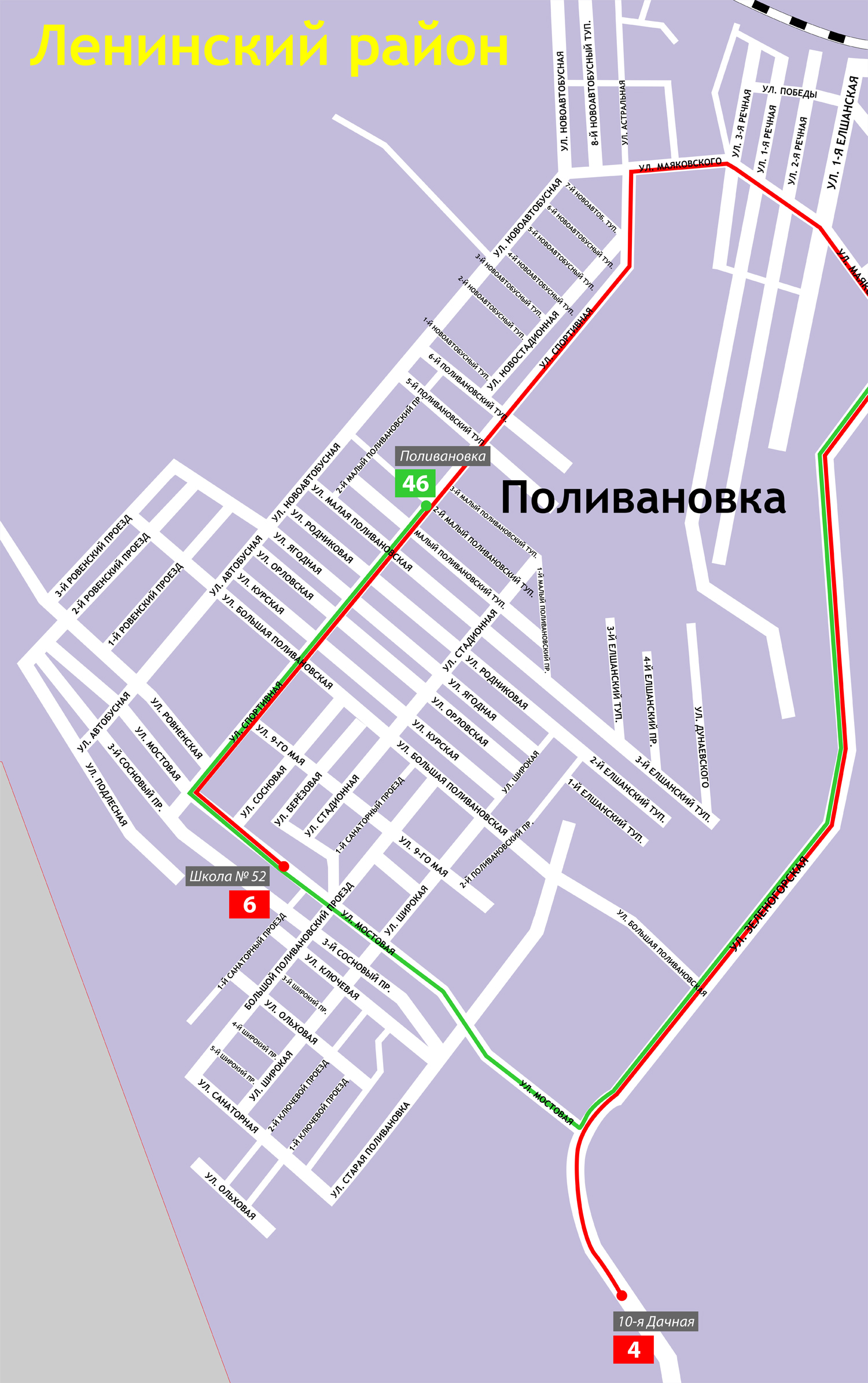 Карта Поливановки (Саратов)